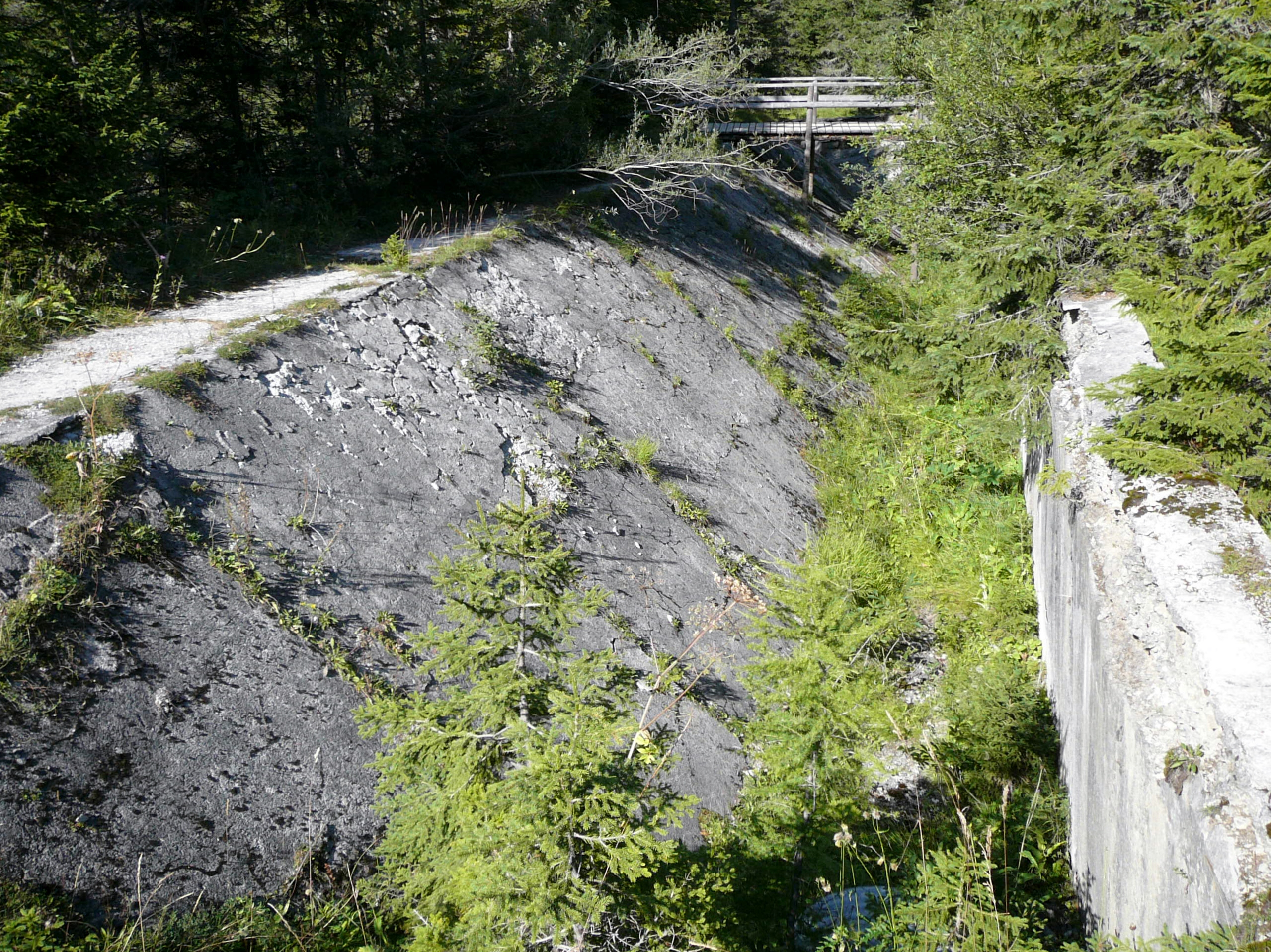 Fossato anti carro passo Monte Croce di Comelico